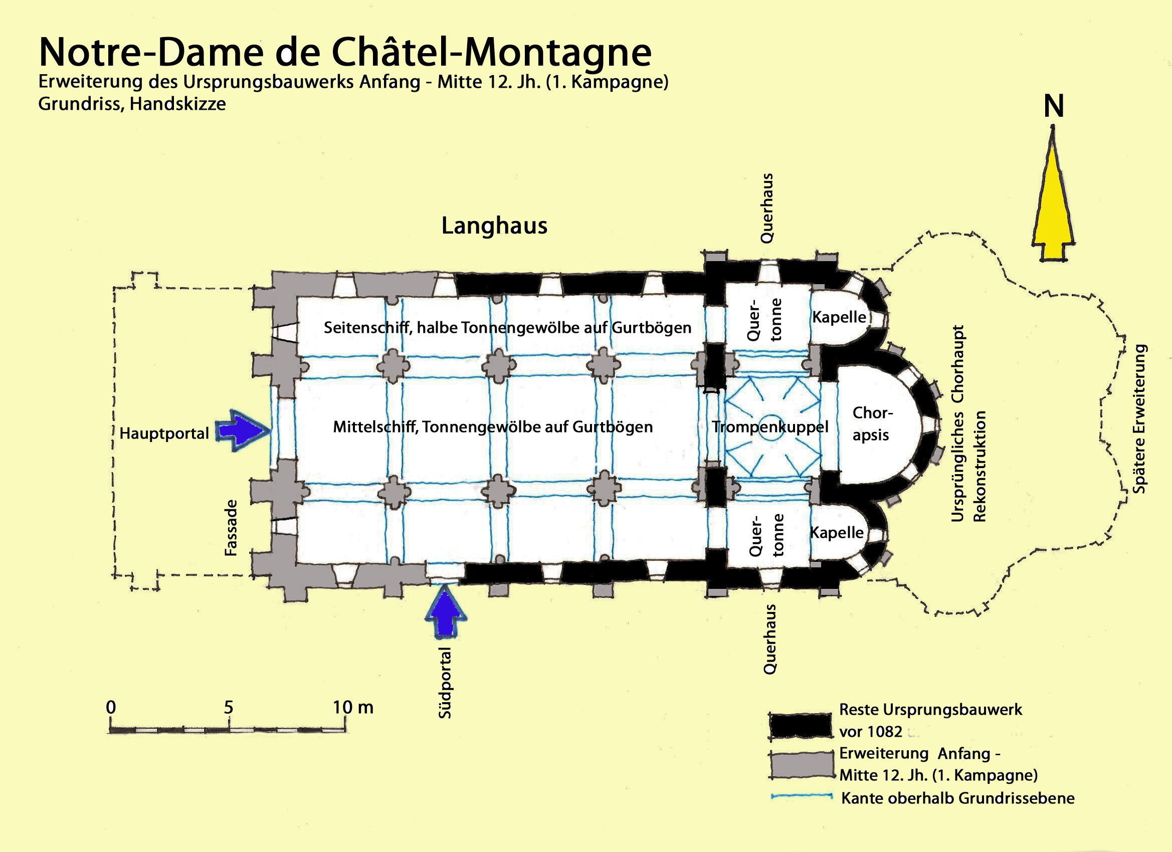 N.-D._de_Châtel-Montagne,_erste_Erweiterung,_Grundris, Handskizze